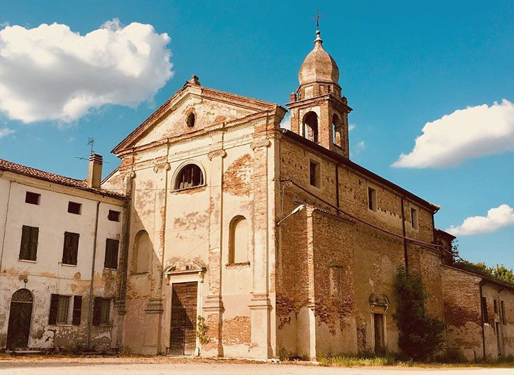 La facciata